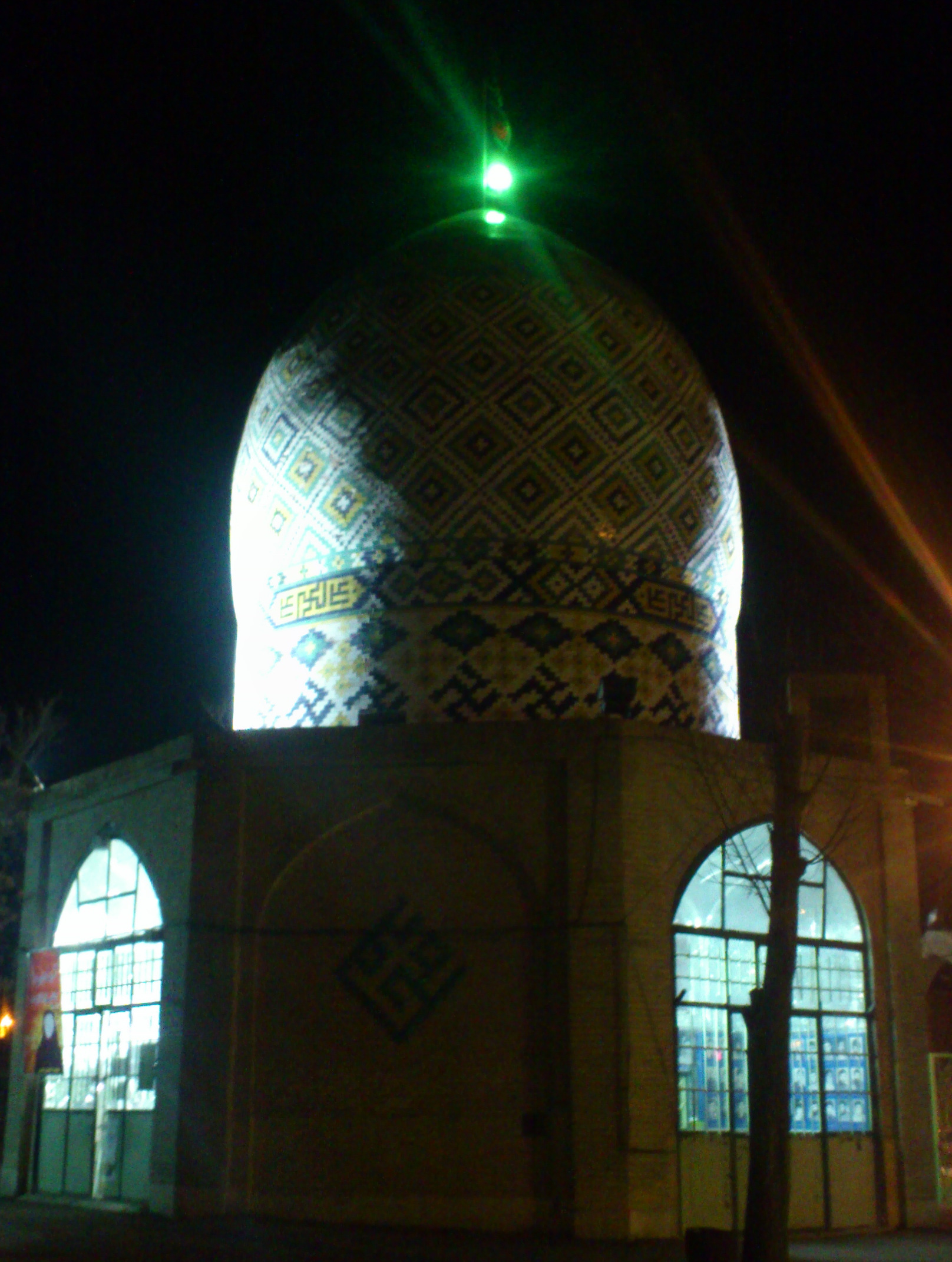 بقعهٔ امامزاده اسماعیل شناط